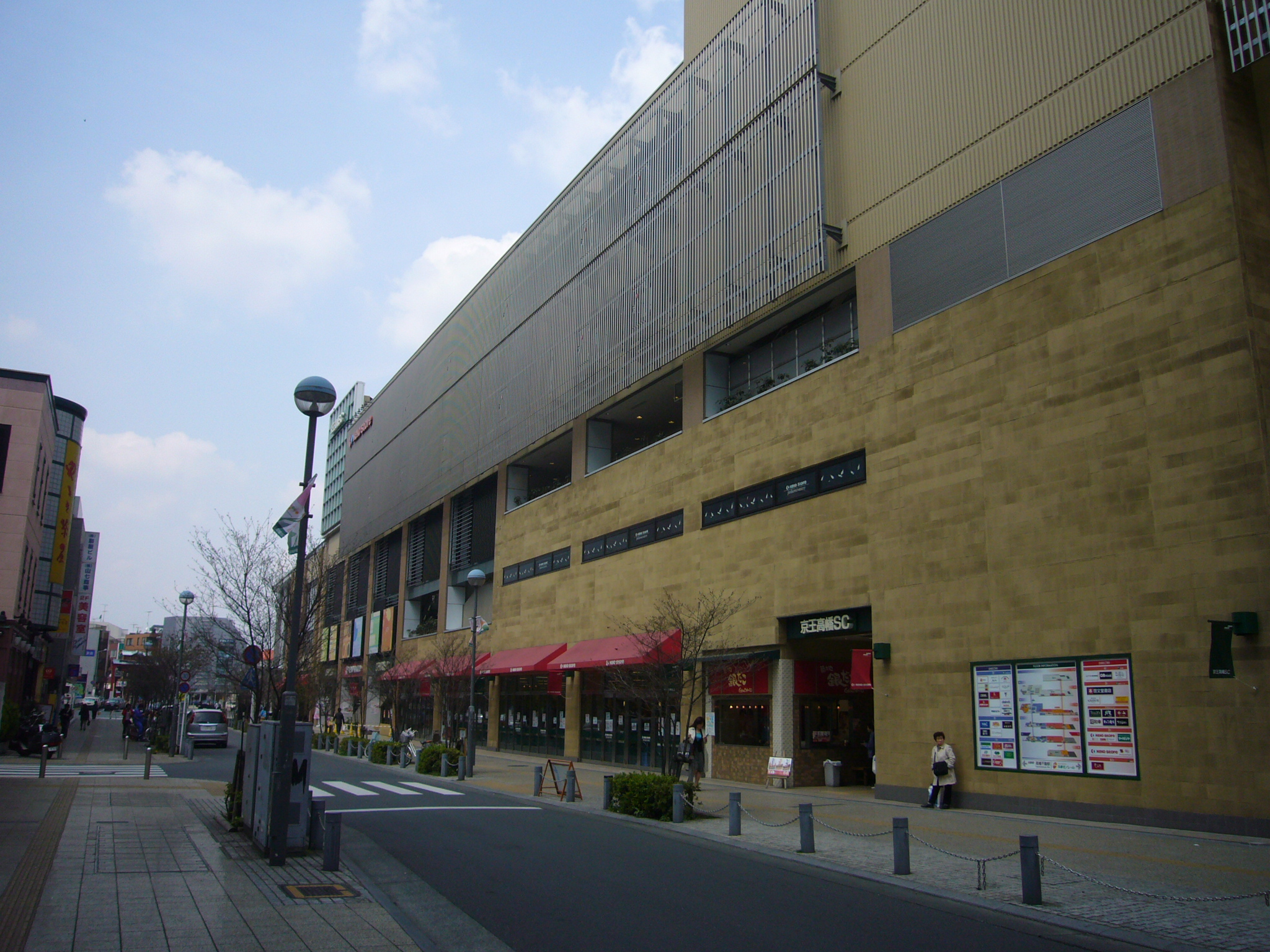 Keio Takahata Shopping Centre